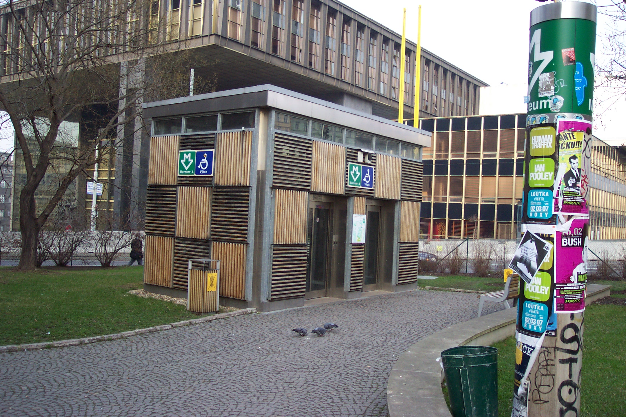 Metro station Muzeum elevator - Výtah ze stanice metra Muzeum